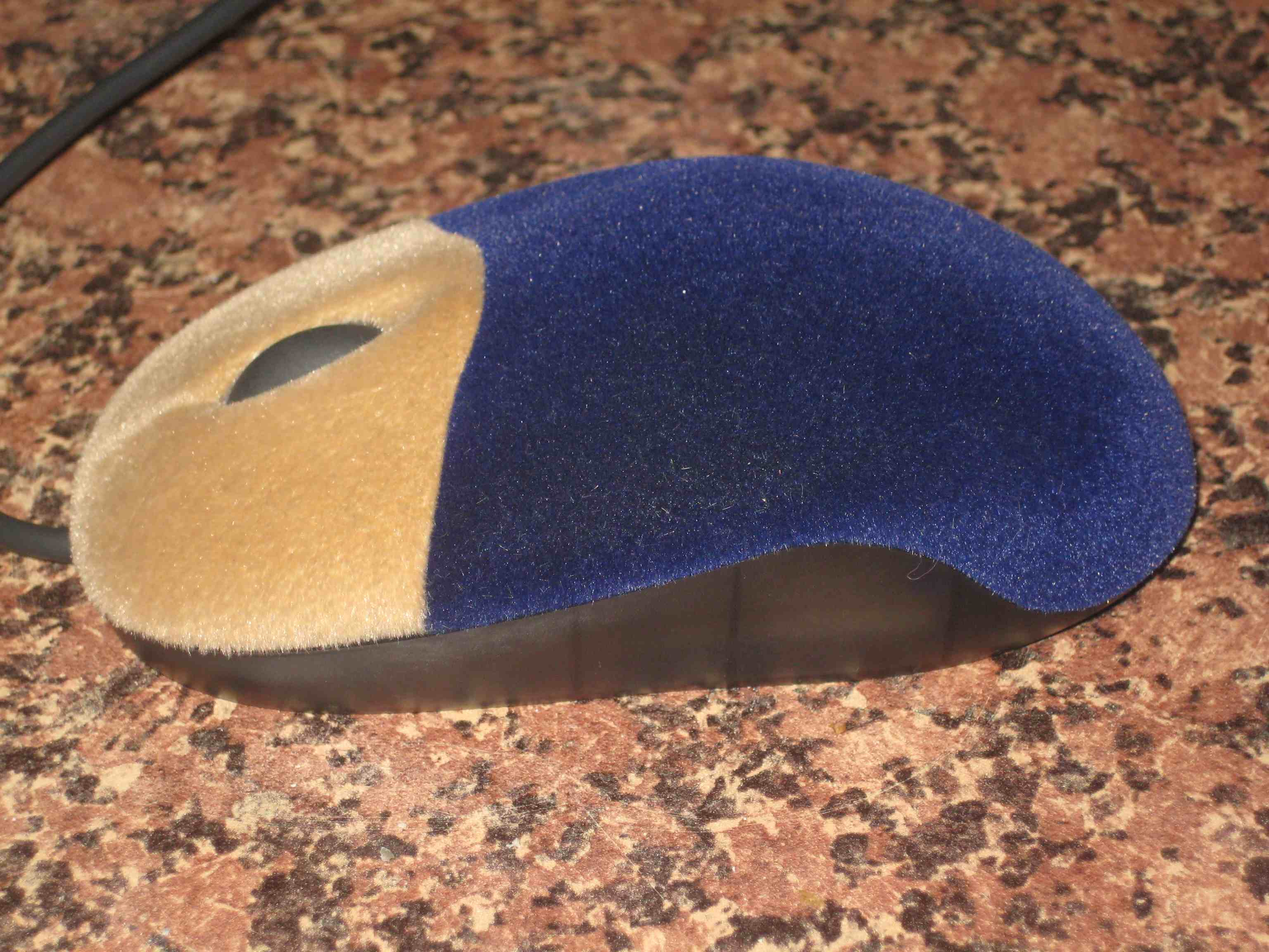 Флокирование мышки ПК сделано флоком полиамид 1мм